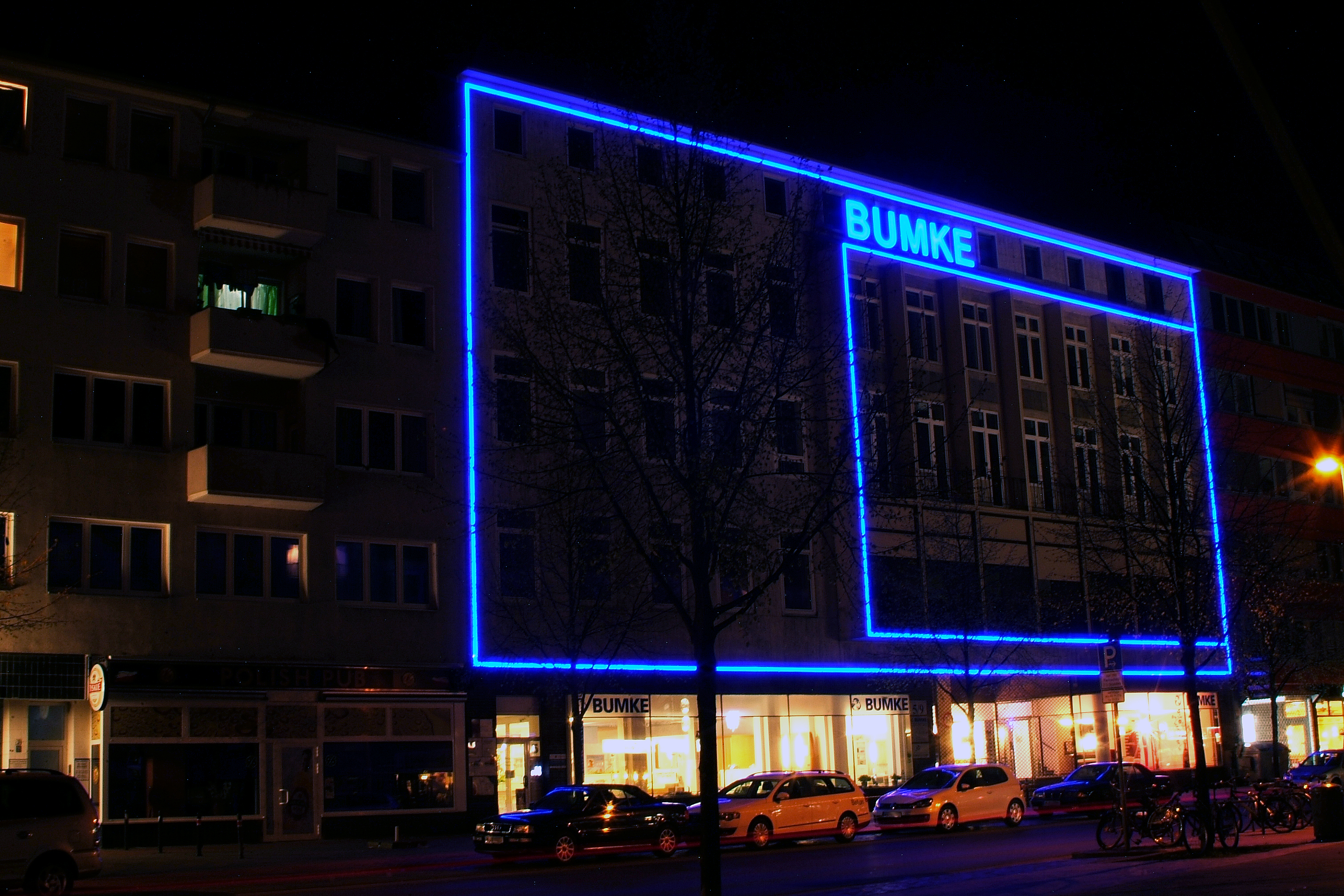 Sie haben ein besseres Bild? Sogar ein historisches Dokument als Bild(ungsförderung)? Zeigen Sie' s uns. Stiften Sie es, allen Menschen.